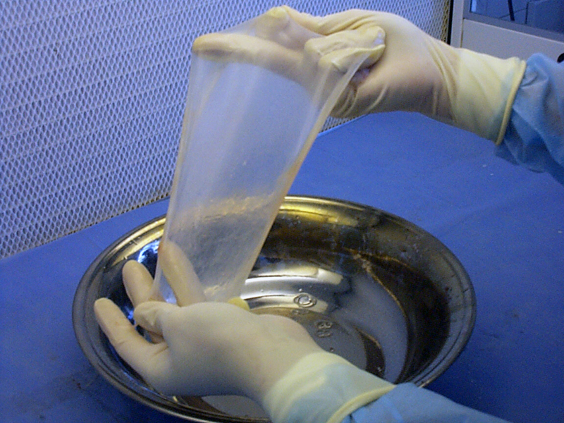 Imagen de amnios manejado en el INDT con fines médicos.